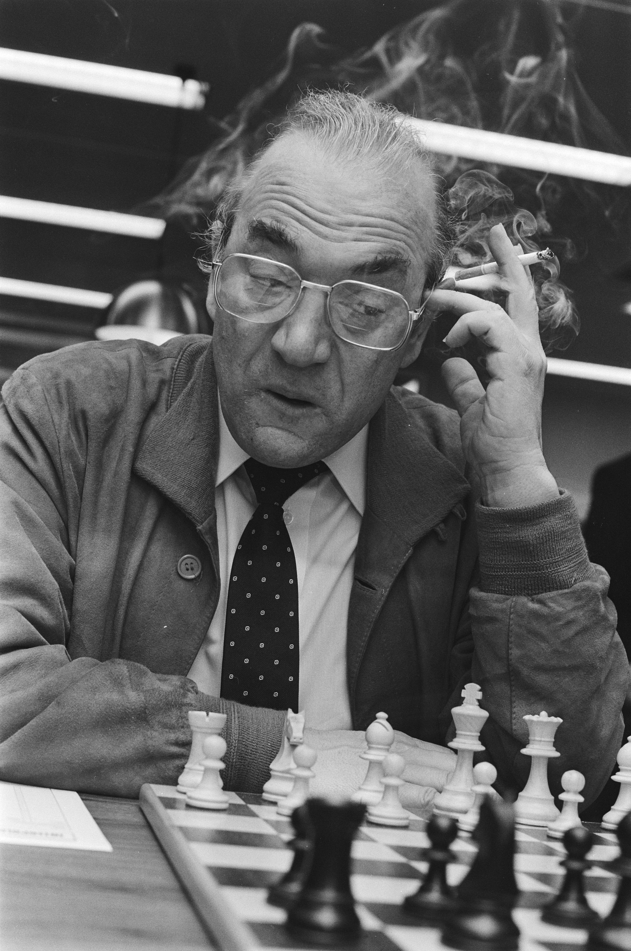 Collectie / Archief : Fotocollectie Anefo Reportage / Serie : [ onbekend ] Beschrijving : Interpolisschaaktoernooi Tilburg; Victor Kortsjnoj in actie (close) Datum : 10 september 1985 Locatie : Noord-Brabant, Tilburg Trefwoorden : schaken Persoonsnaam : Interpolisschaaktoernooi Fotograaf : Bogaerts, Rob / Anefo Auteursrechthebbende : Nationaal Archief Materiaalsoort : Negatief (zwart/wit) Nummer archiefinventaris : bekijk toegang 2.24.01.05 Bestanddeelnummer : 933-4180